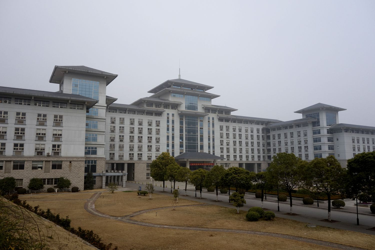 南京农业大学 卫岗校区 逸夫楼